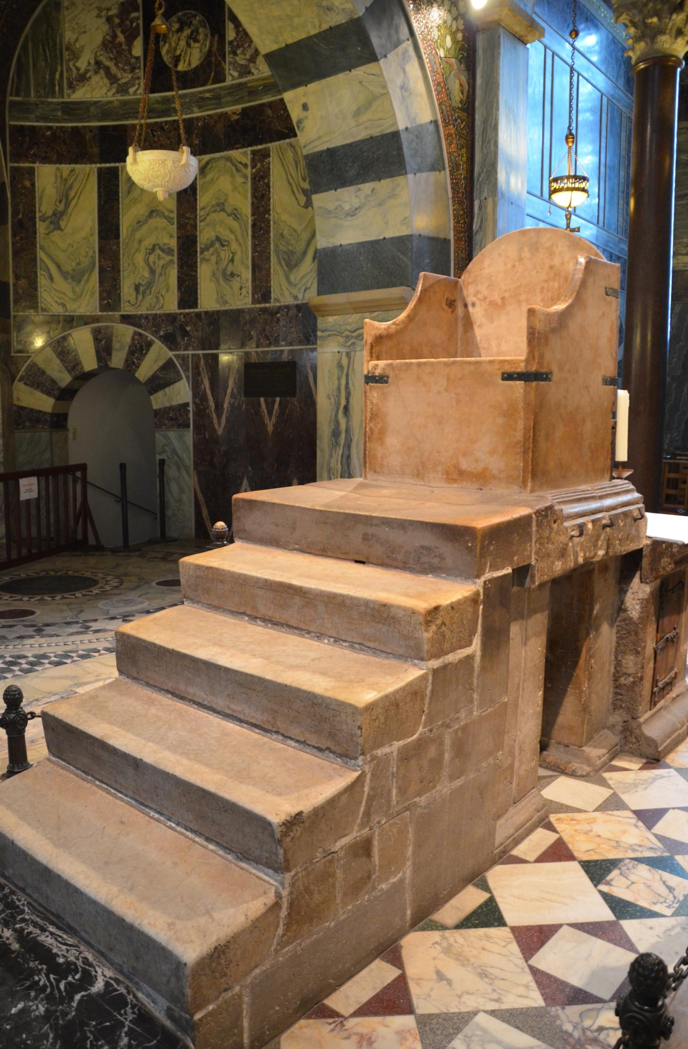 Thron Karls des Großen